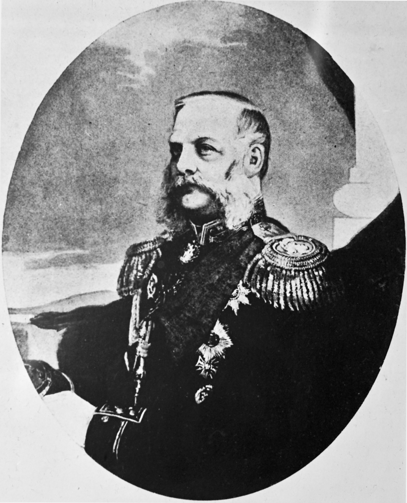 Исаков Н.В. (1821-1891). Генерал от инфантерии. В 1863-1881 гг. главный начальник военно-учебных заведений. В ходе военной реформы 1860-1870 осуществил переустройство кадетских корпусов военной гимназии, основал педогогические курсы, учительскую гимназию военного ведомства, педагогическую библиотеку и музей